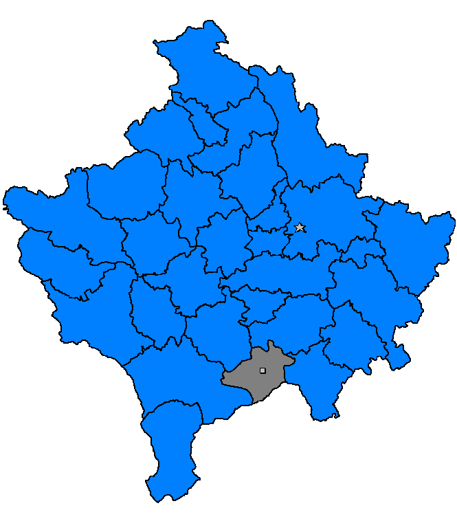 Shtërpcë, Kosovë 2006